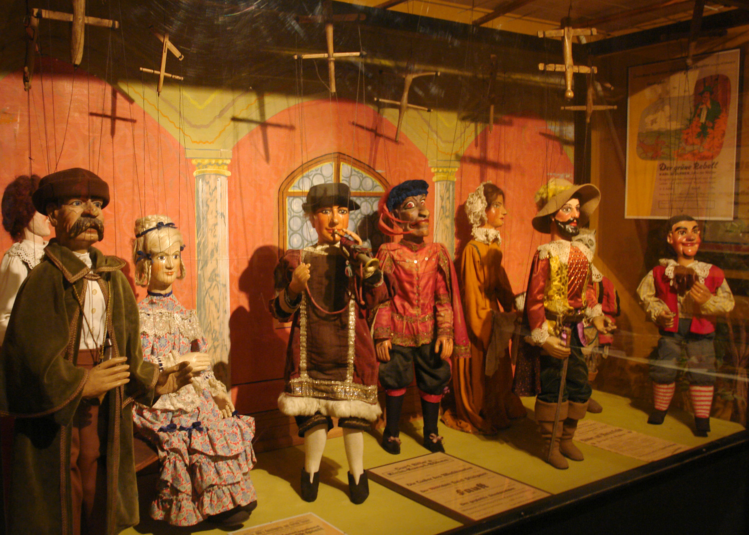 Lübecker Theaterfigurenmuseum